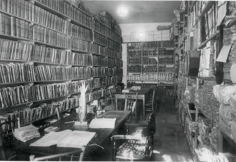 Arxiu Històric de Terrassa a la rectoria de les Esglésies de Sant Pere